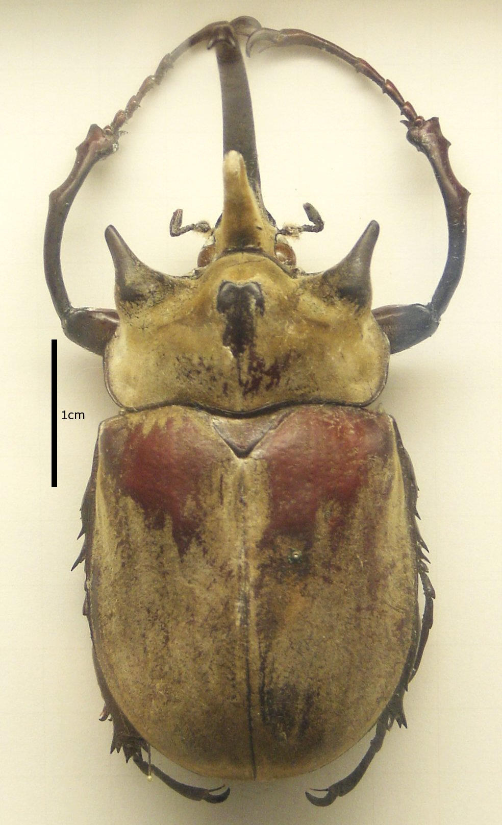 Megasoma elephas (Scarabaeidae), mounted specimen from Venezuela.